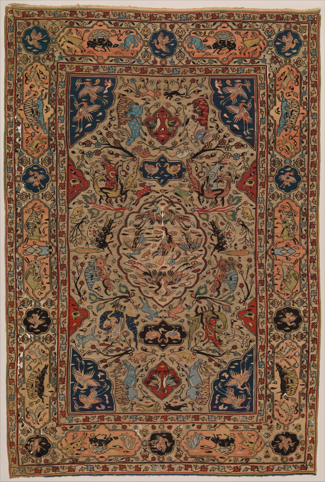 Textiles ;Rugs ; carpets